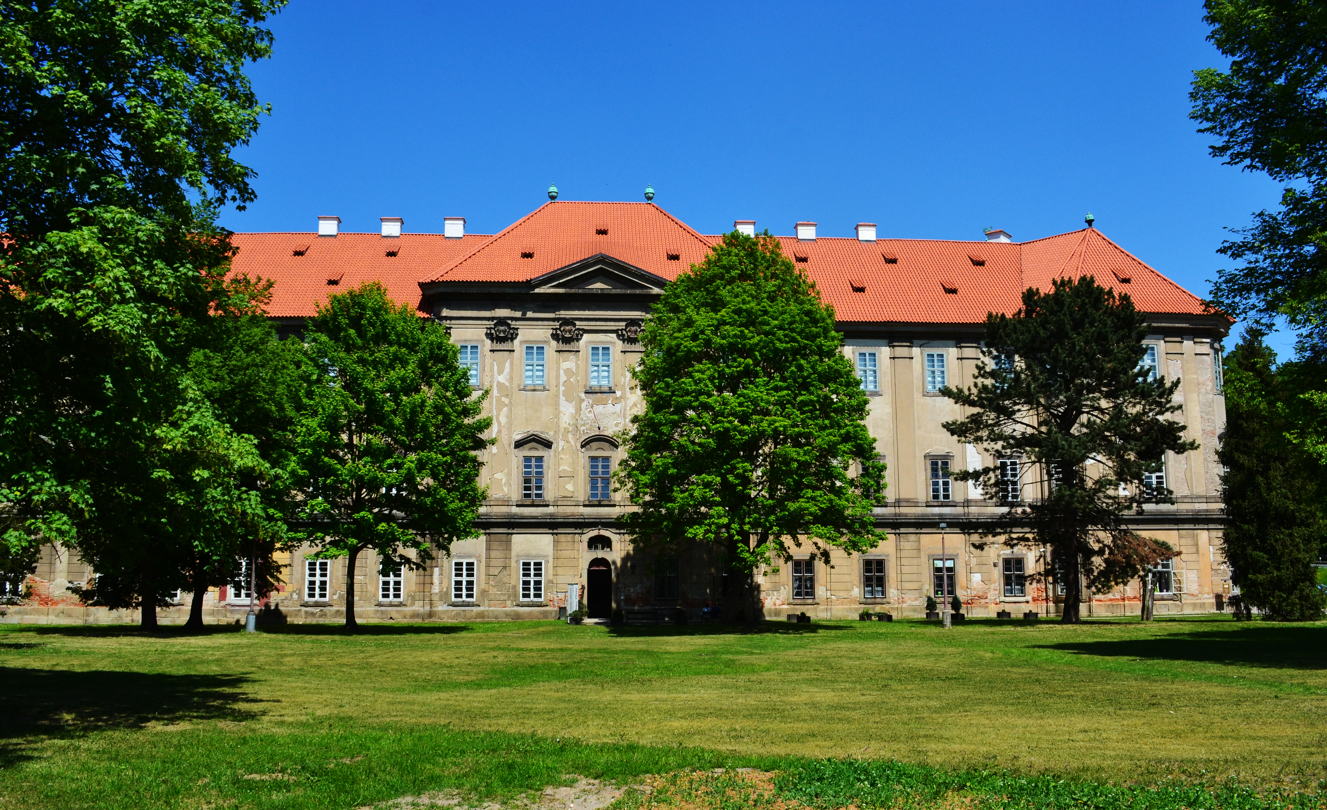 Fotografie vstupu do konventu.